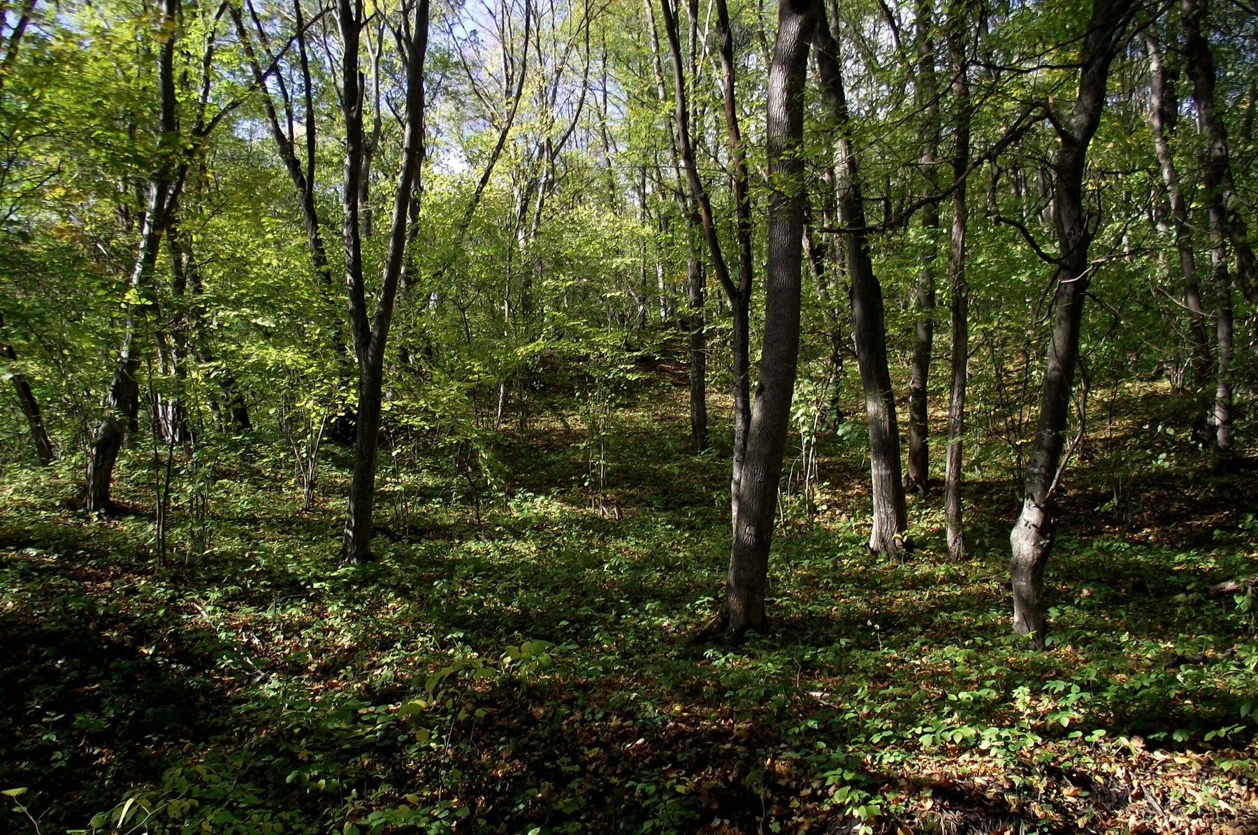 Загальна площадка городища Ґовда